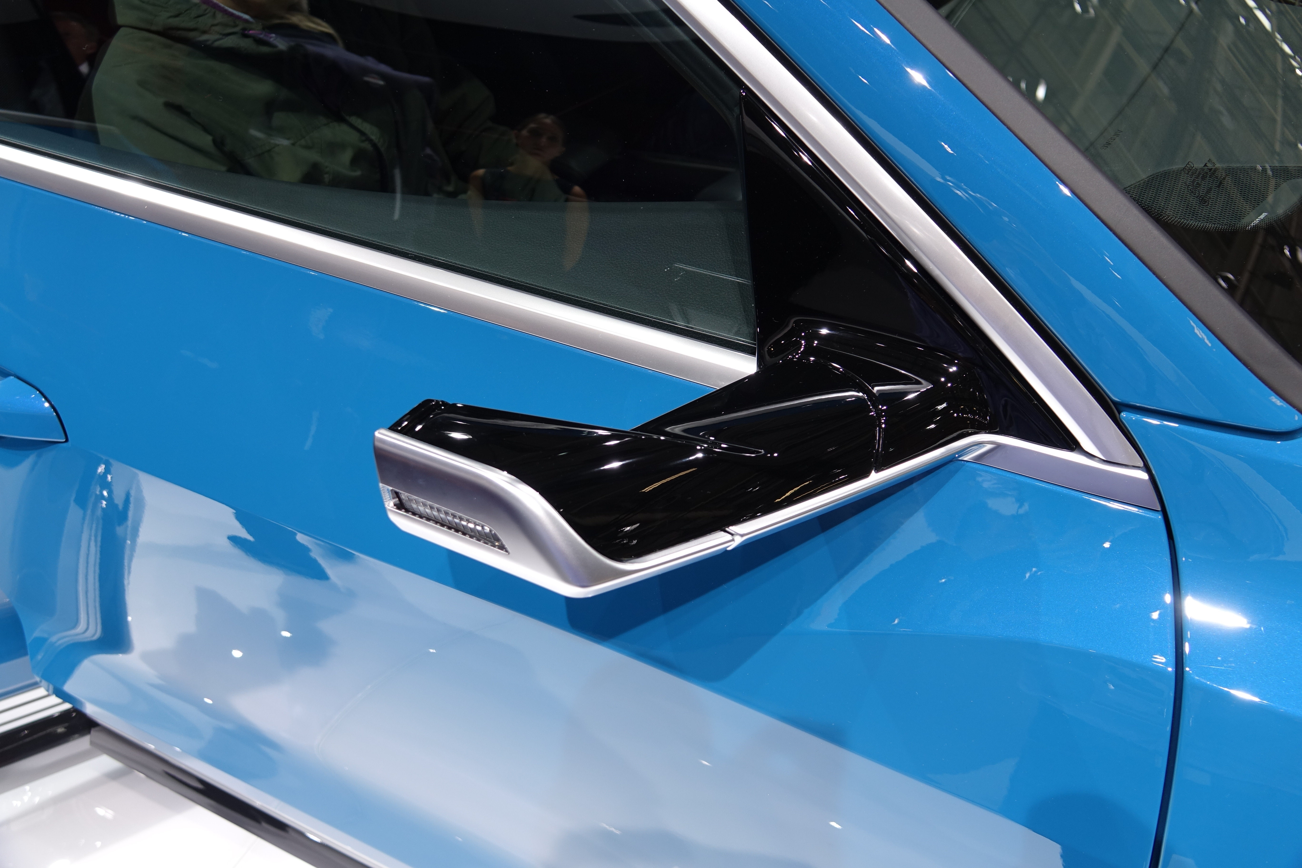 Rétrovision par caméra de l'Audi e-tron quattro